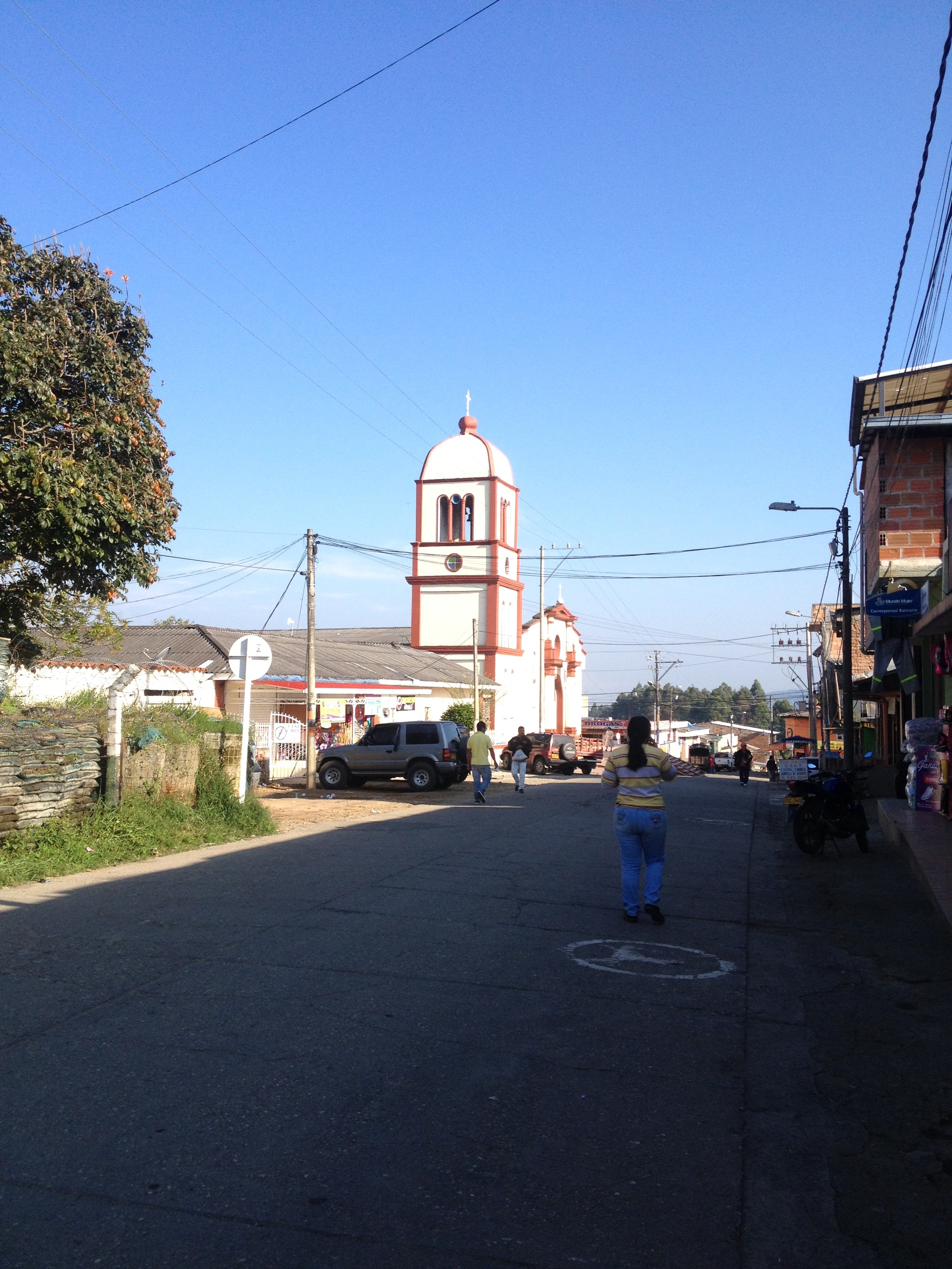 Esta fotografía fue tomada en el municipio colombiano con código 19548.